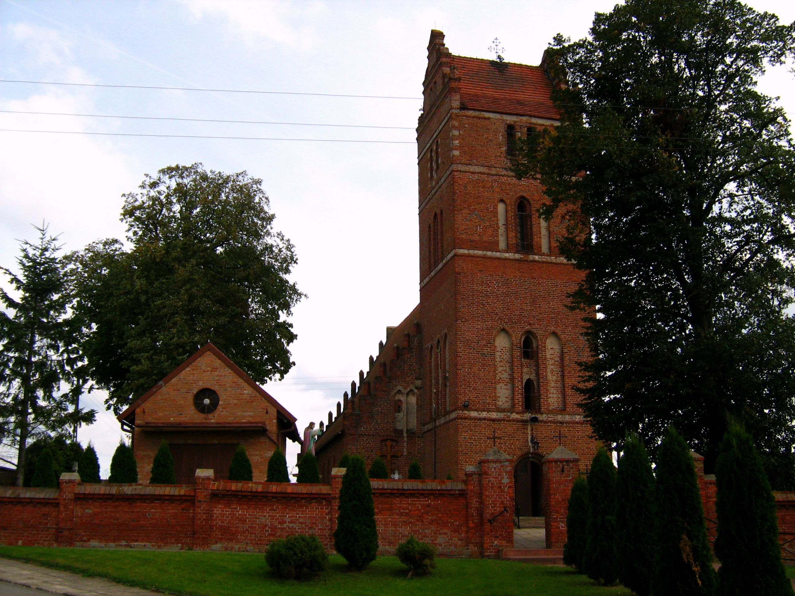 Gotycki Kościół Niepokalanego Poczęcia NMP we wsi Wielki Garc z XVI wieku. Widok od strony zachodniej na front kościoła i kaplicę cmentarną. Kościół zbudowany z cegły, posiada masywną wieżę i 3 nawy. W wieży 2 dzwony (z 1782 i 1974 roku) oraz stary mechanizm zegarowy. Dach dwuspadowy. Wnętrze z XVII/XVIII wieku. kościół parafialny p.w.Niepokalanego Poczęcia NMP Wielki Garc